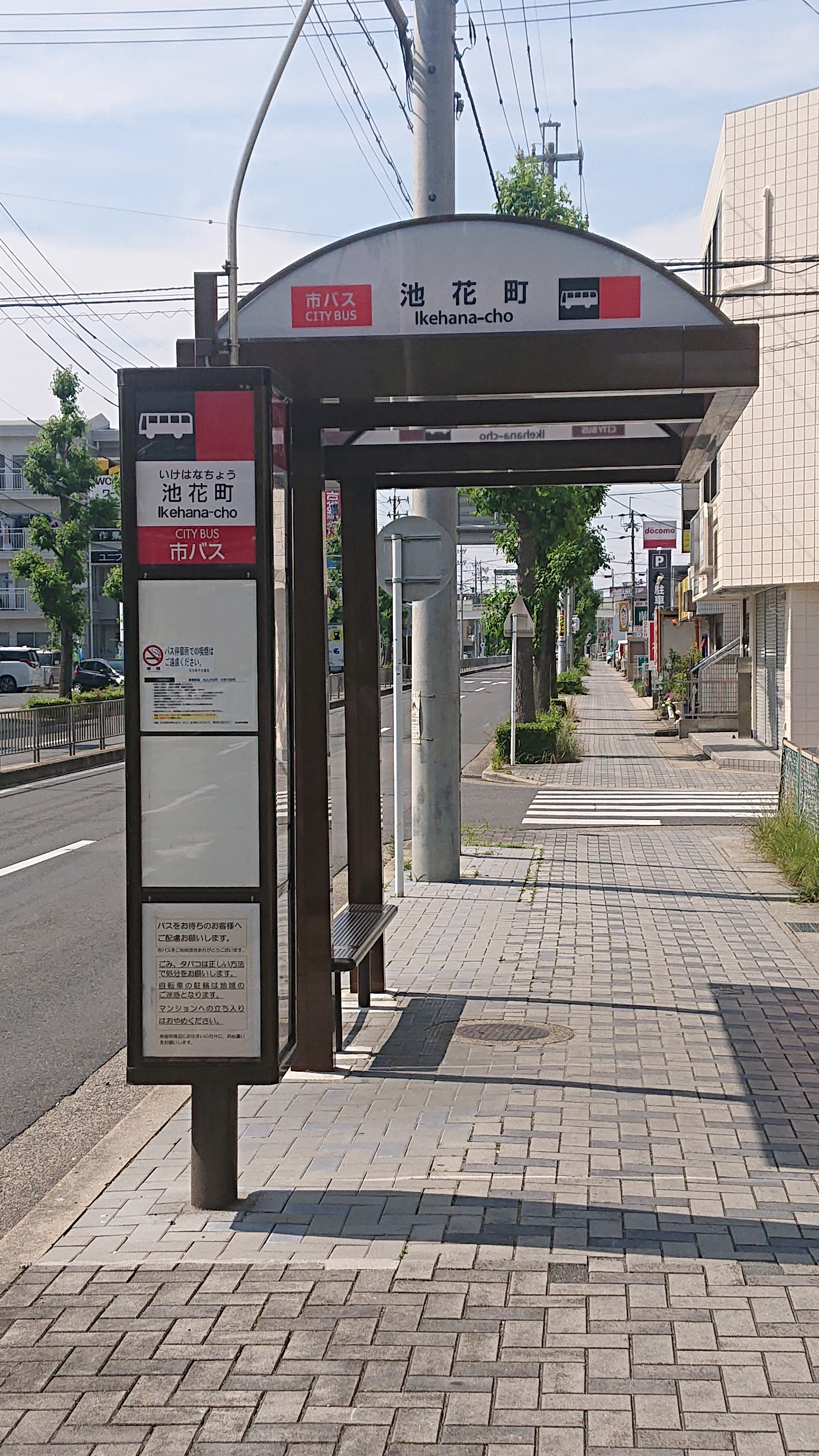 名古屋市北区三軒町 名古屋市営バス池花町停留所